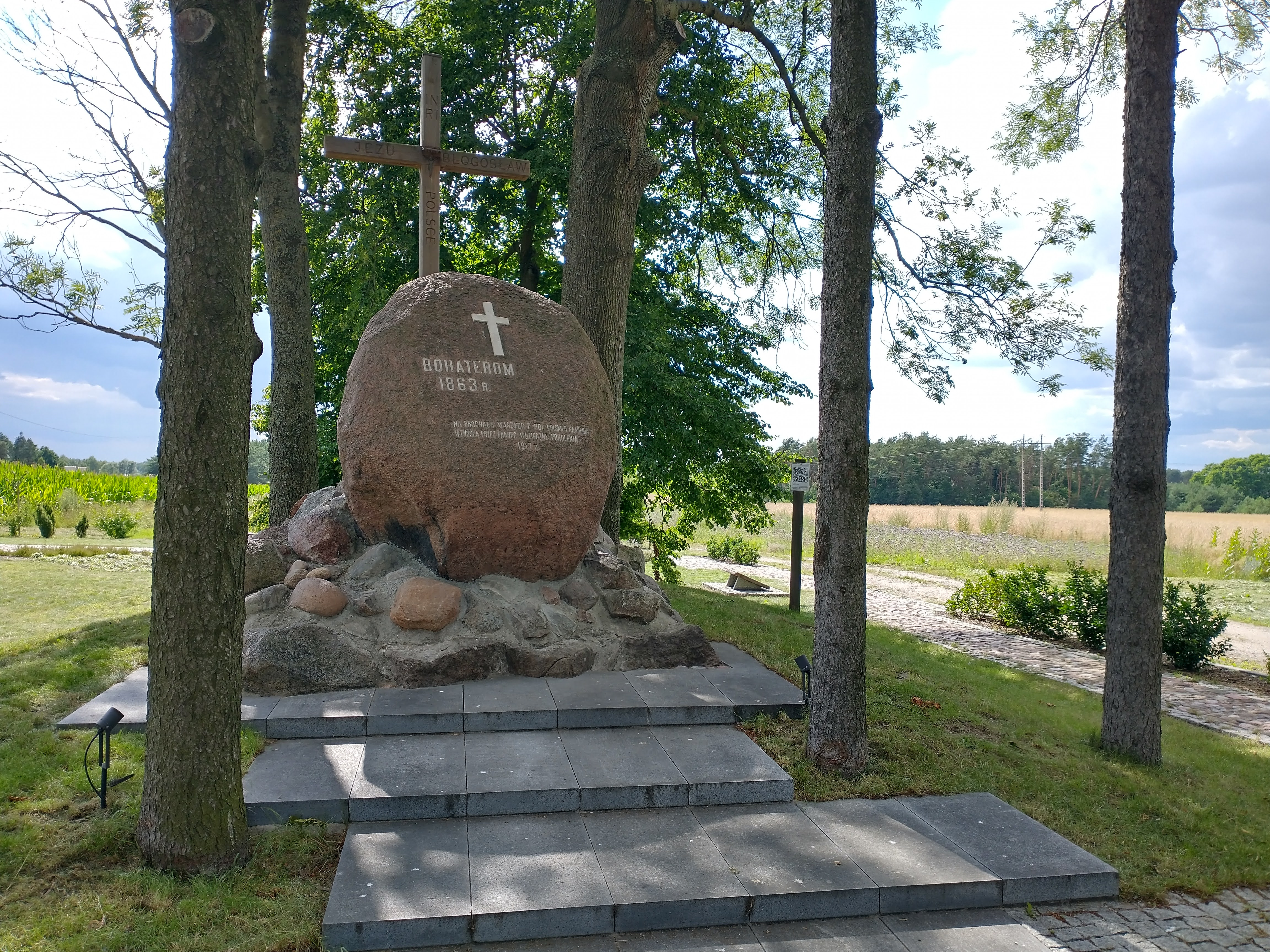 Cmentarz i pomnik powstańców styczniowych w Węgrowie.